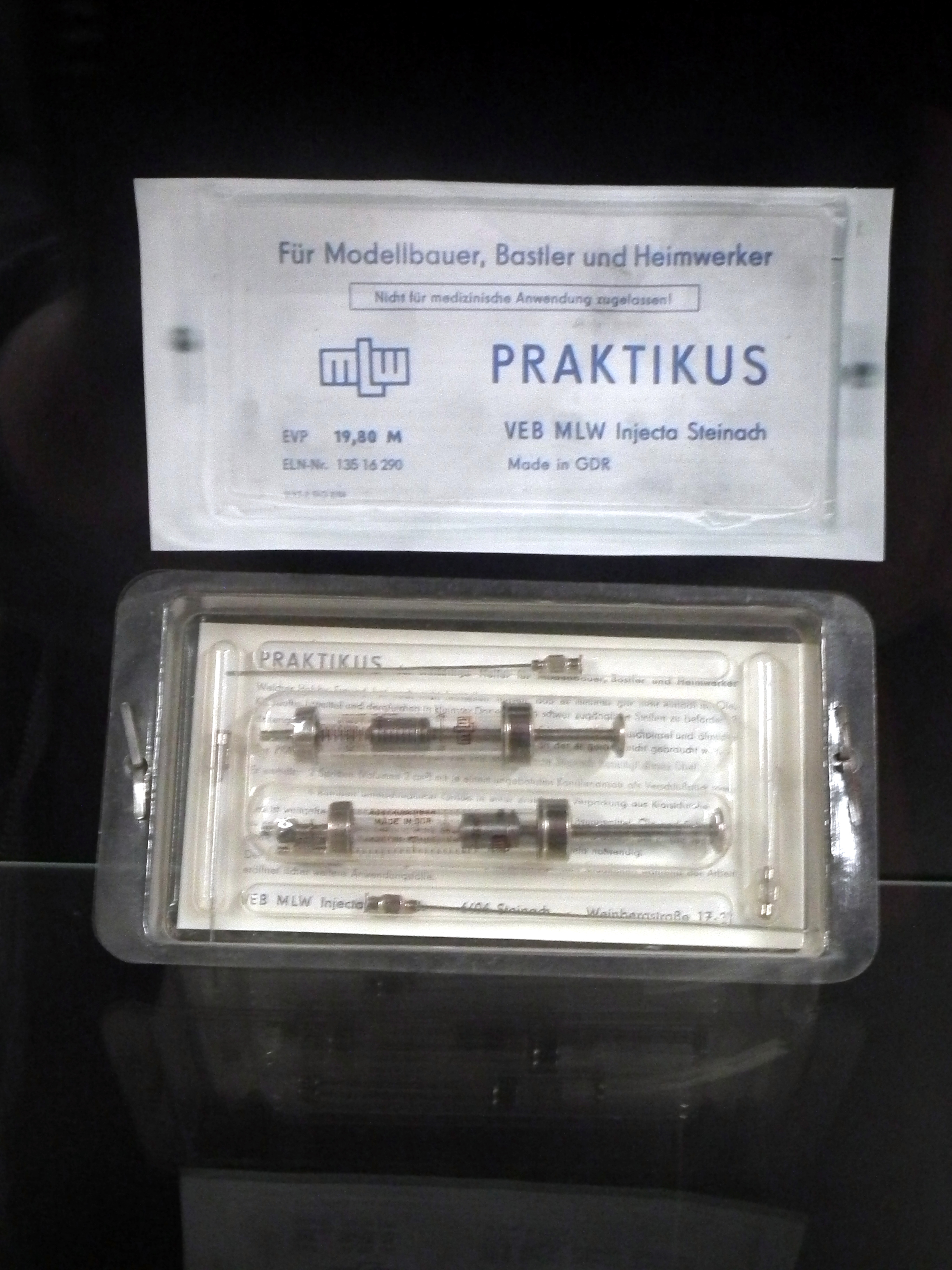 DDR-Museum Pirna, MLW Praktikus Spritze, Veröffentlicht mit Genehmigung der Museumsleitung